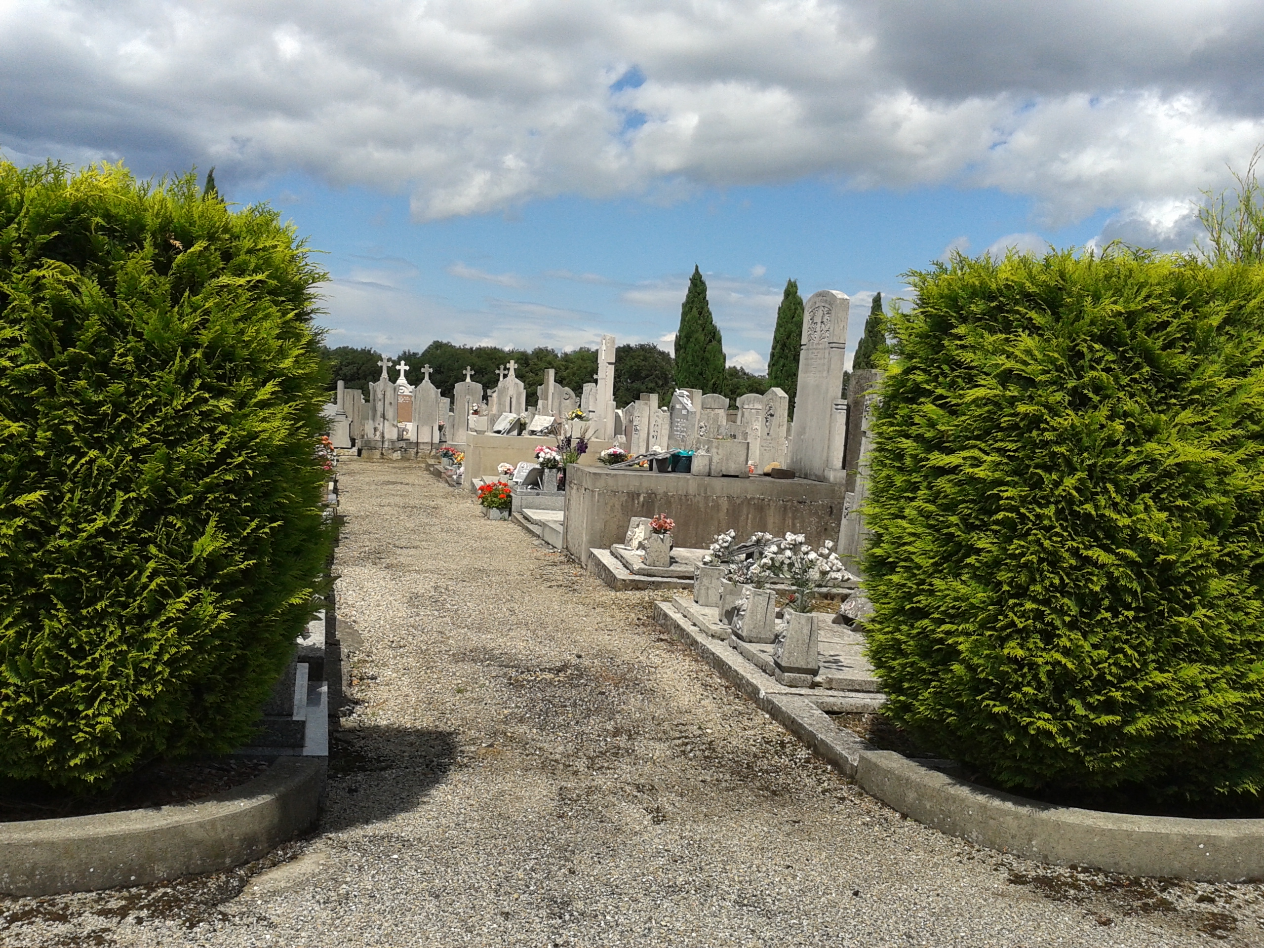 Givors (69700): Une allée du cimetière de Badin.